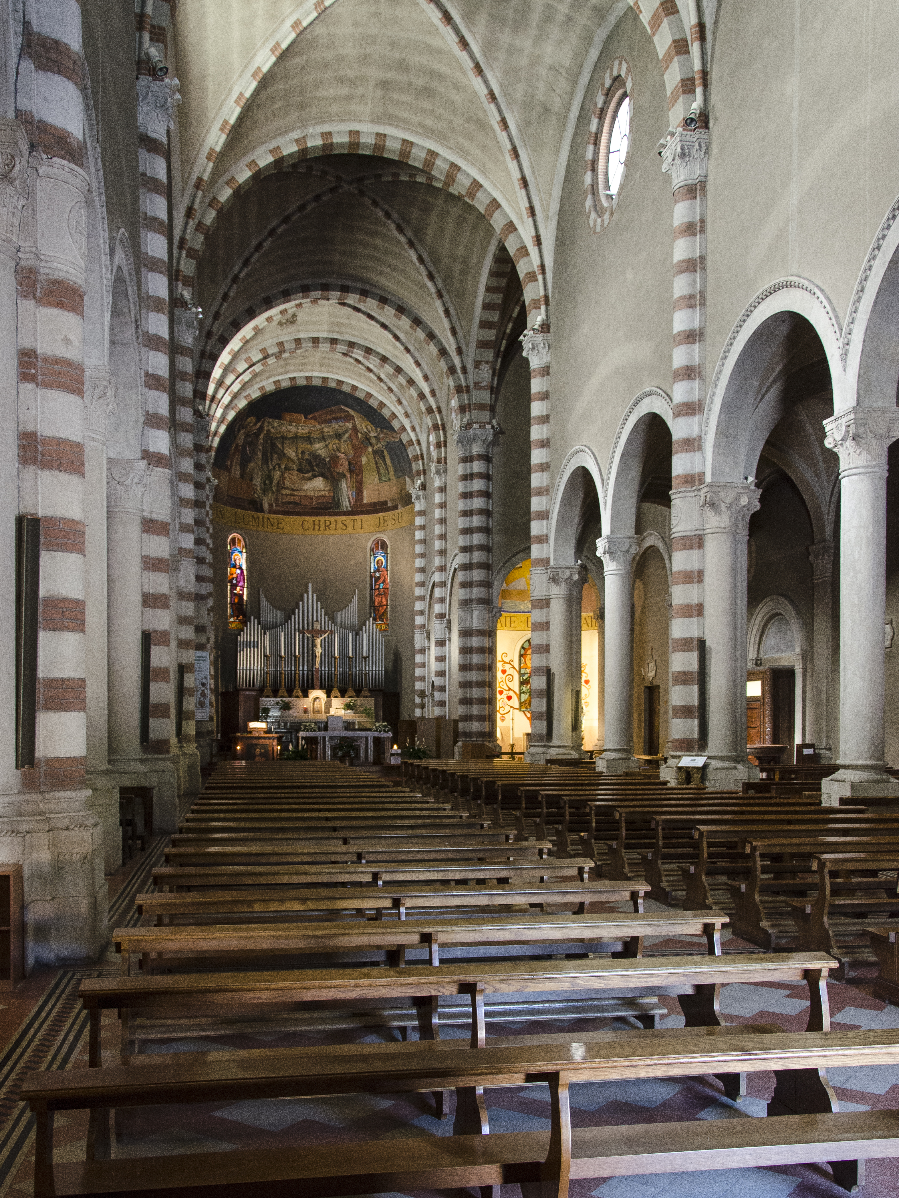 Chiesa di San Giuseppe Fuori Mura a Verona